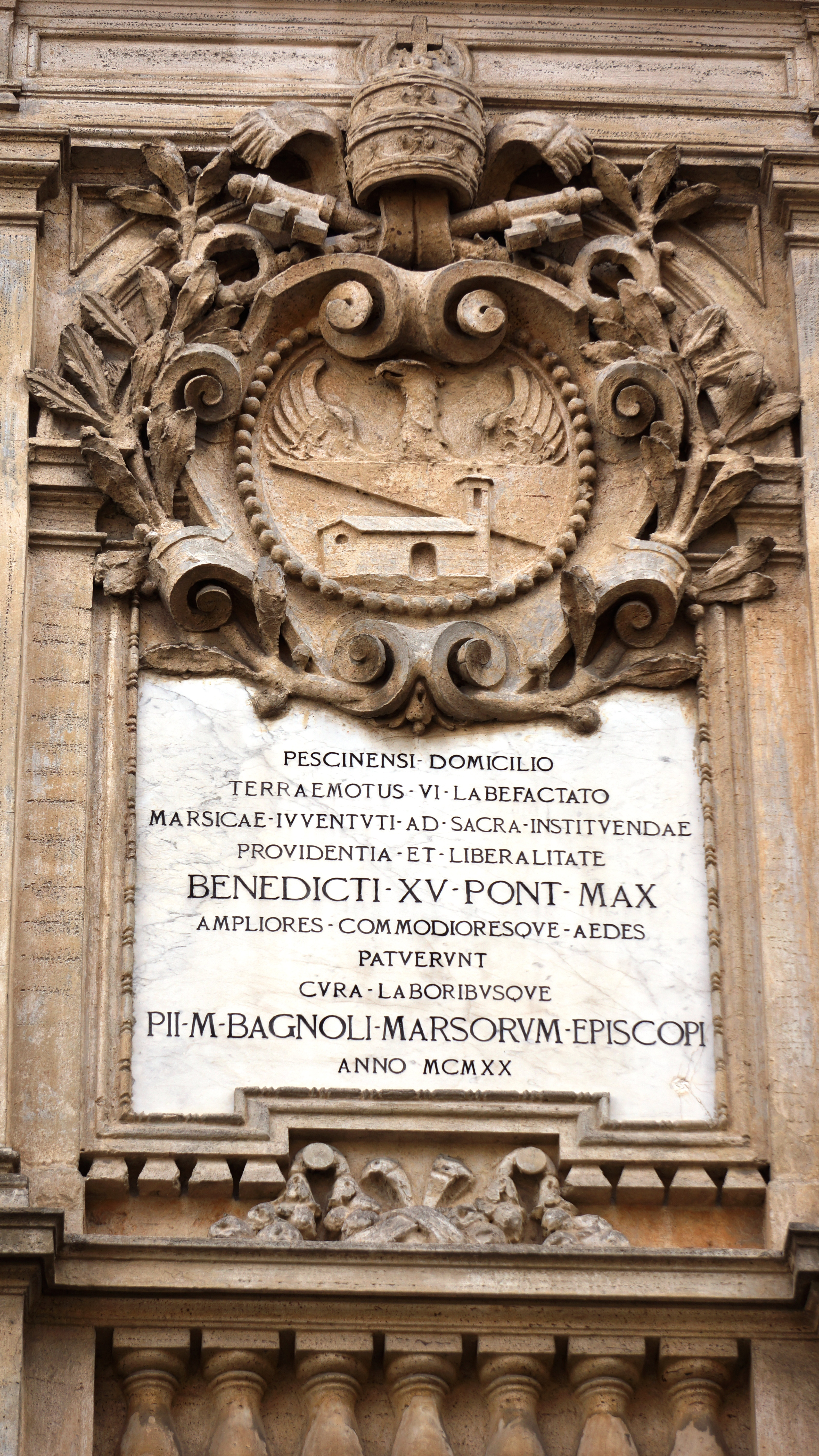 Targa del palazzo Vescovile